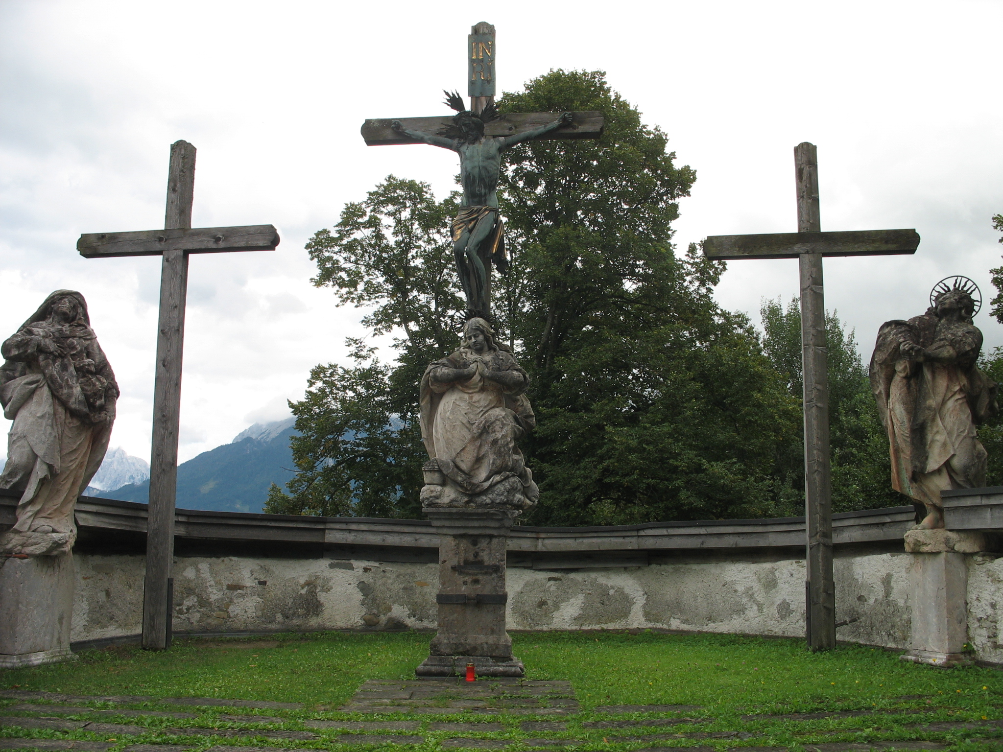 Wallfahrtskirche Frauenberg, Steiermark: Kalvarienberg-Kreuzigungsszene von Josef Stammel